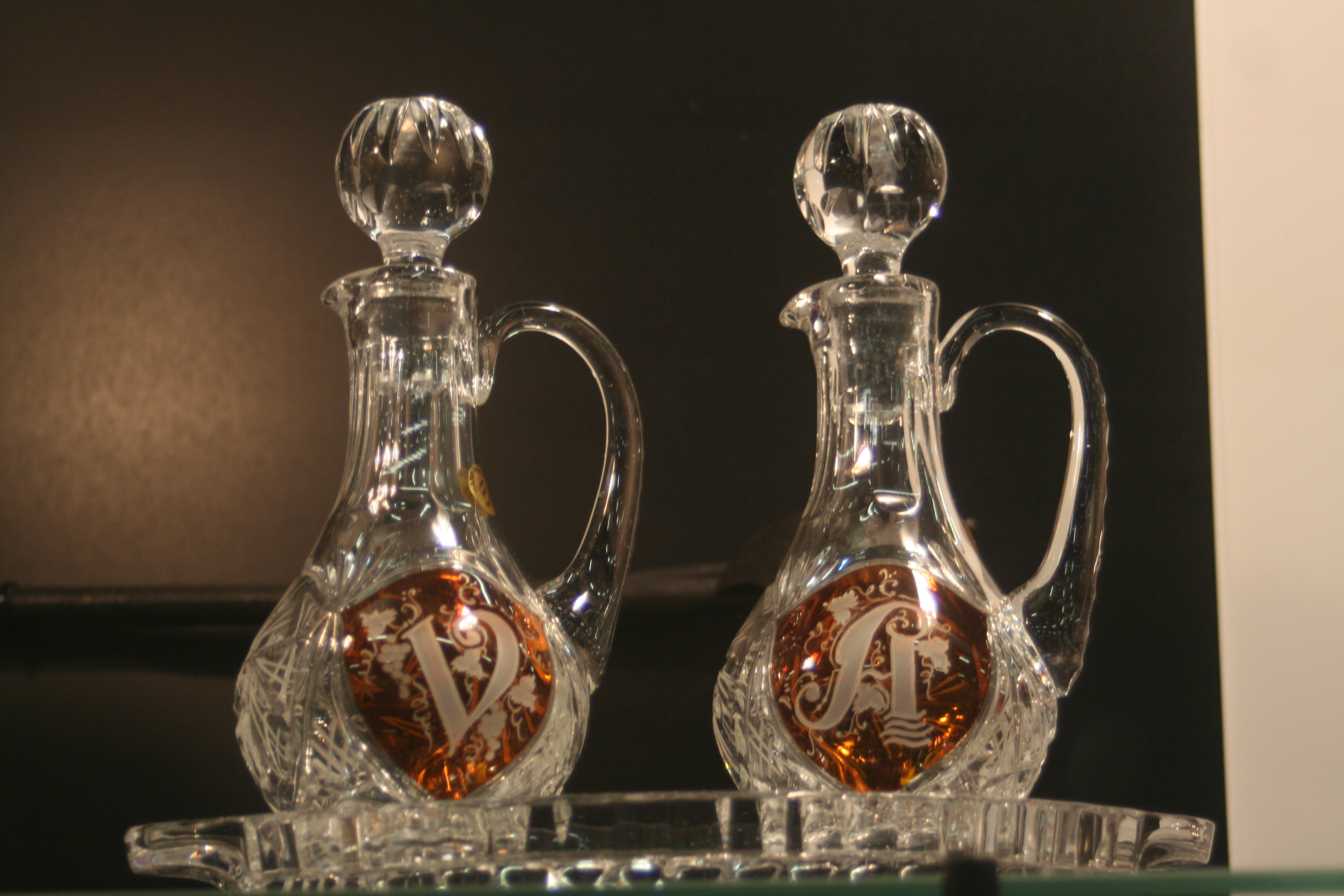 Ampułki (Naczynia liturgiczne) na stoisku jednej z firm na targach SACROEXPO 2013 w Kielcach